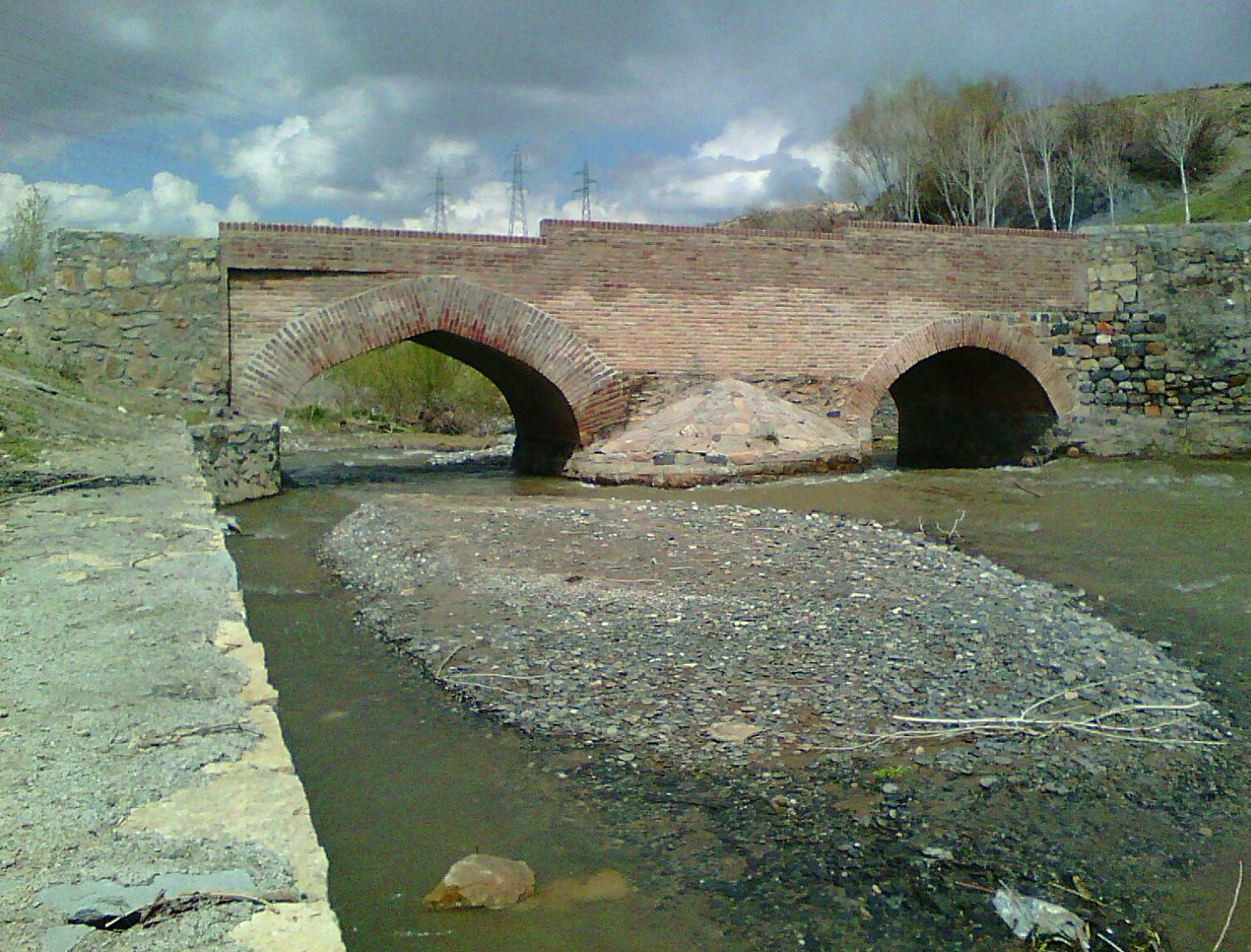 پل آرامند شاهراه کهن همدان به کرمانشاه